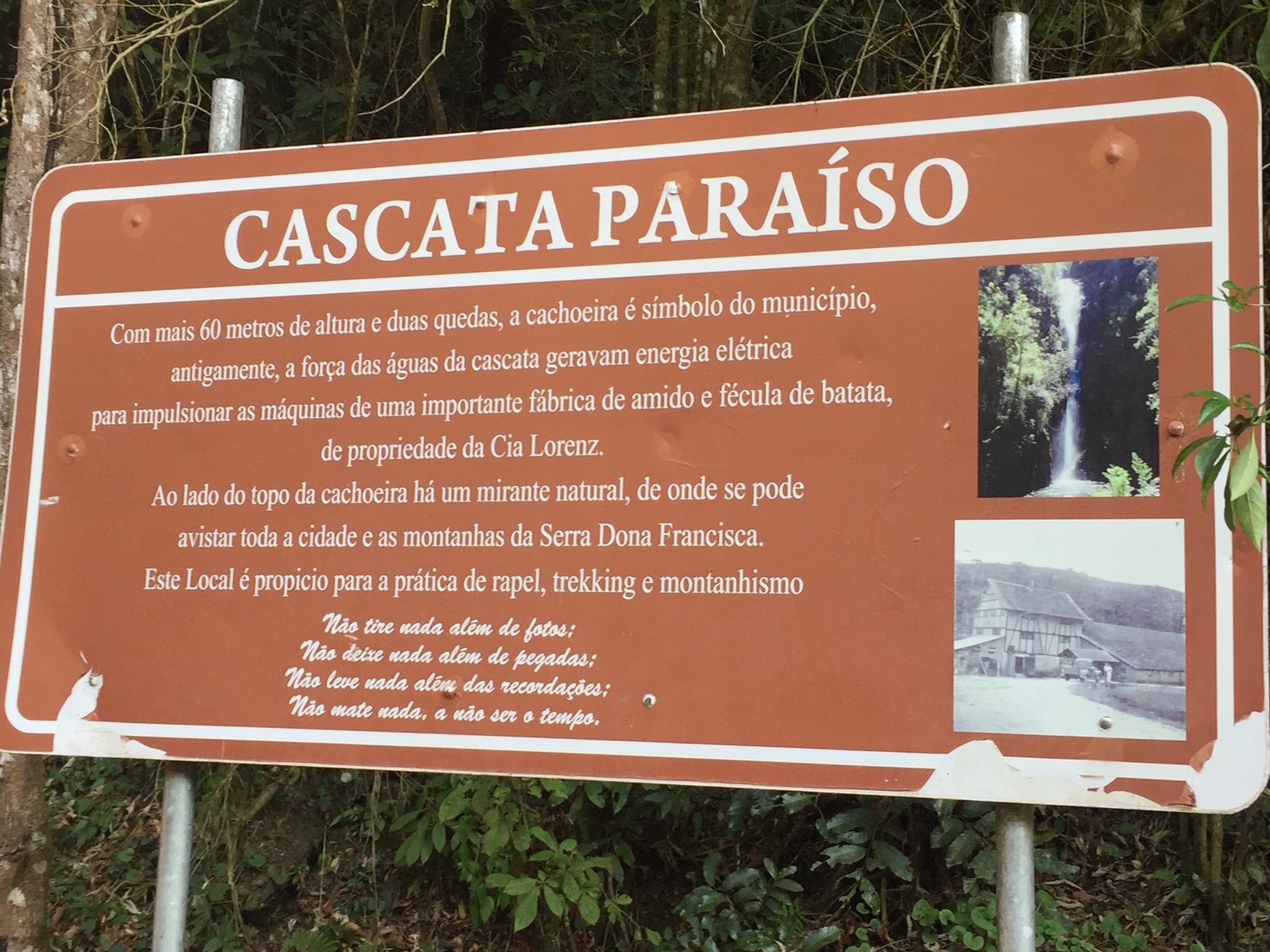 Cascata Paraiso, Campo Alegre (Santa Catarina)